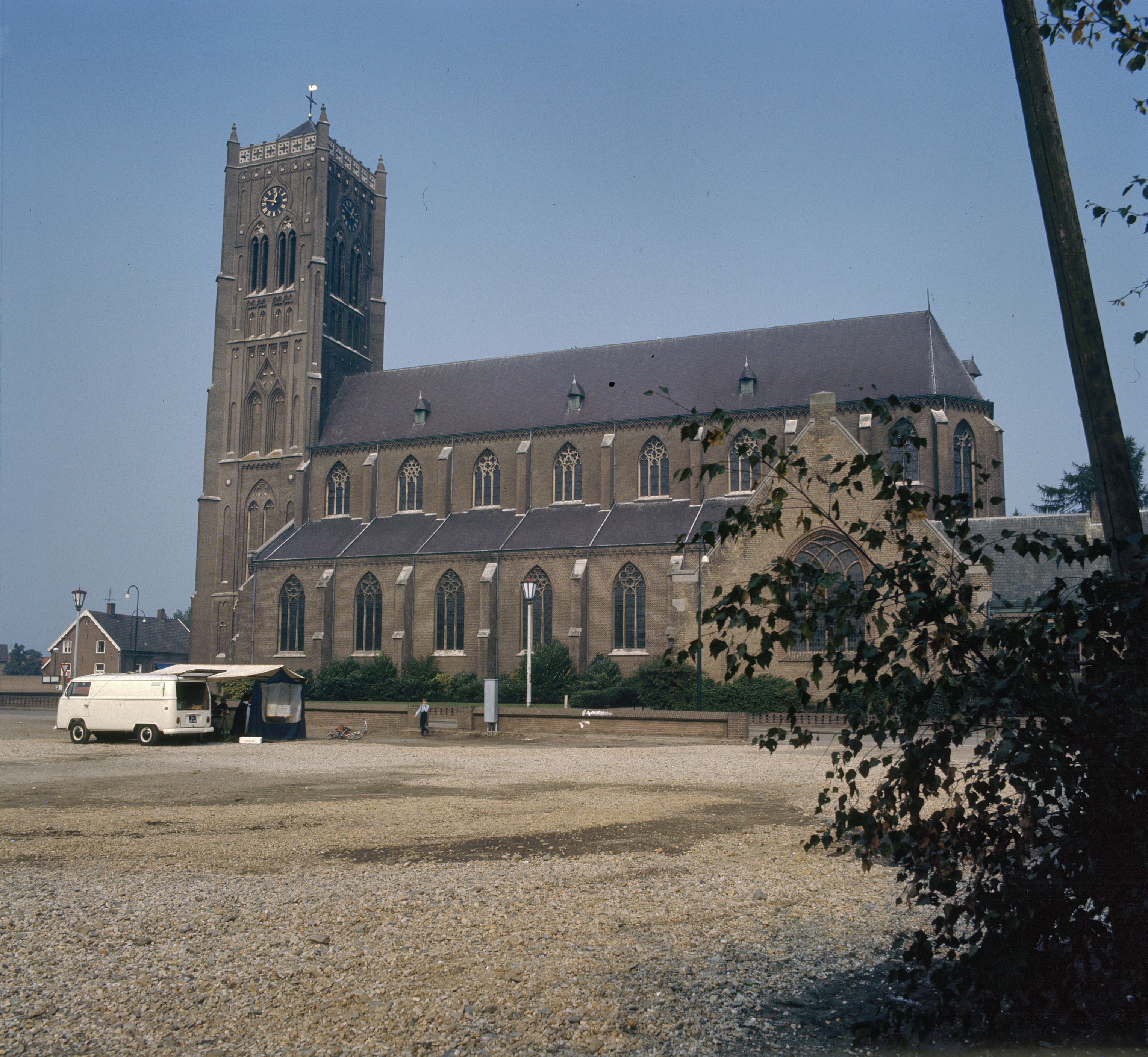 Sint Willibrorduskerk: Overzicht van de zuidgevel met kerktoren